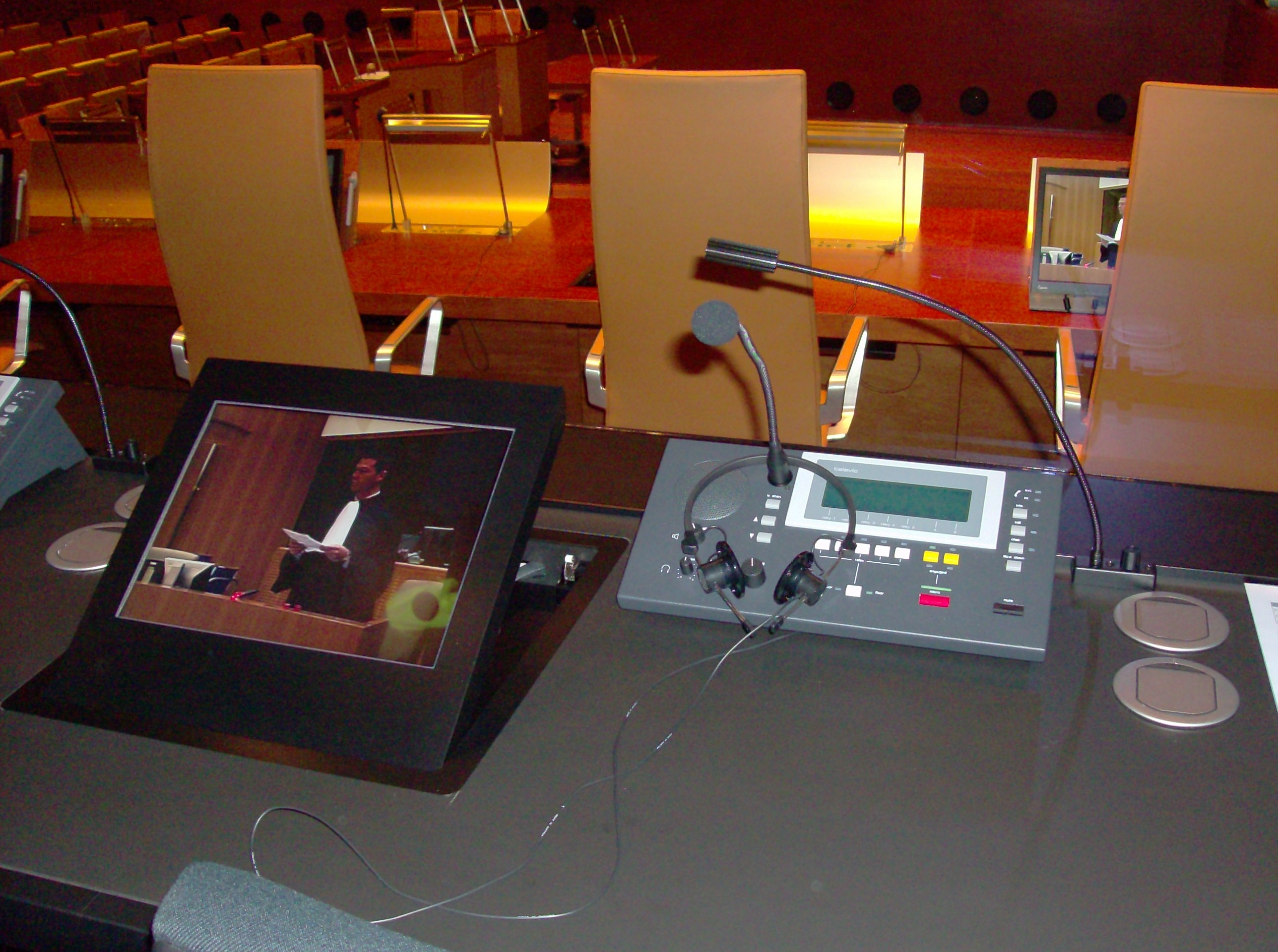 Simultandolmetscheranlage (Televic Conference) beim Europäischen Gerichtshof